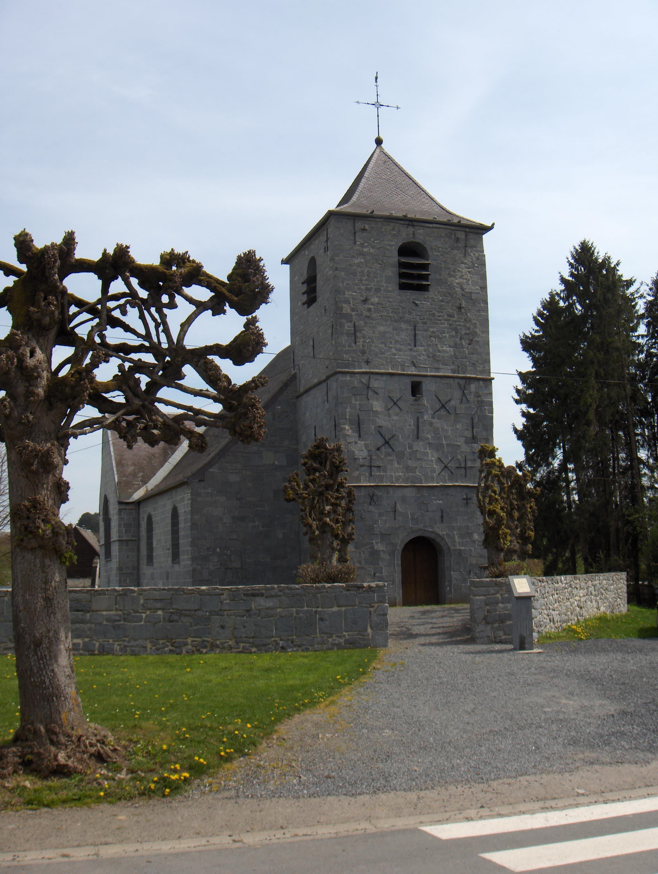 Wallers-en-Fagne, dépt. Nord, Nord-Picardie. Eglise paroissiale Saint-Hilaire, XVIIe siècle.